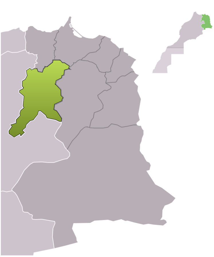 موقع إقليم جرسيف في جهة الشرق، المغرب